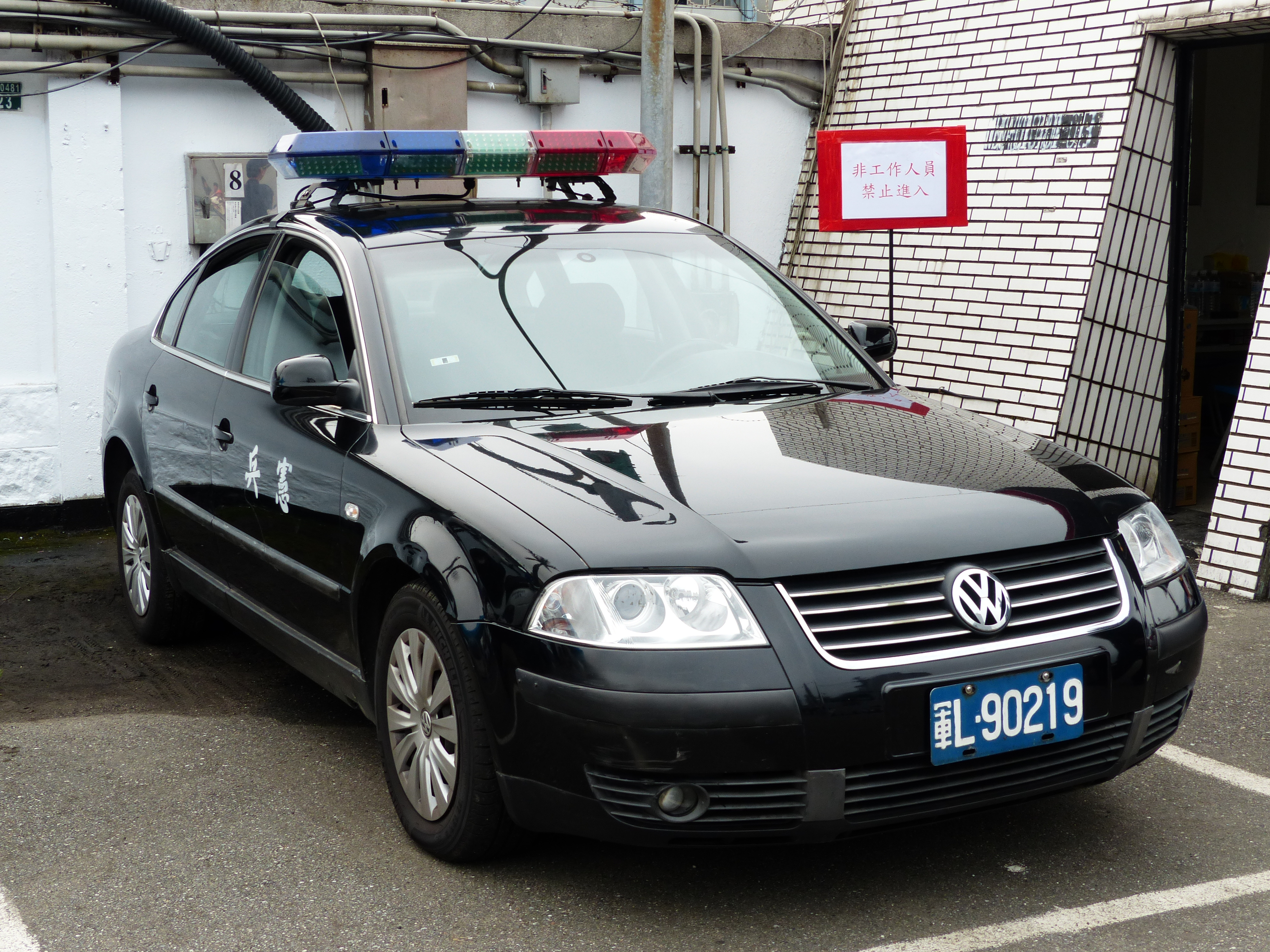 海軍103敦睦遠航訓練支隊基隆訪問，海軍碼頭正門旁的基隆憲兵隊VW Passat警備車。